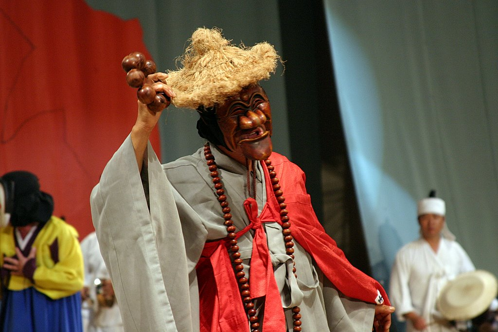 Hahoe Folk Village in Andong, Gyeongsangbuk-do, South Korea.